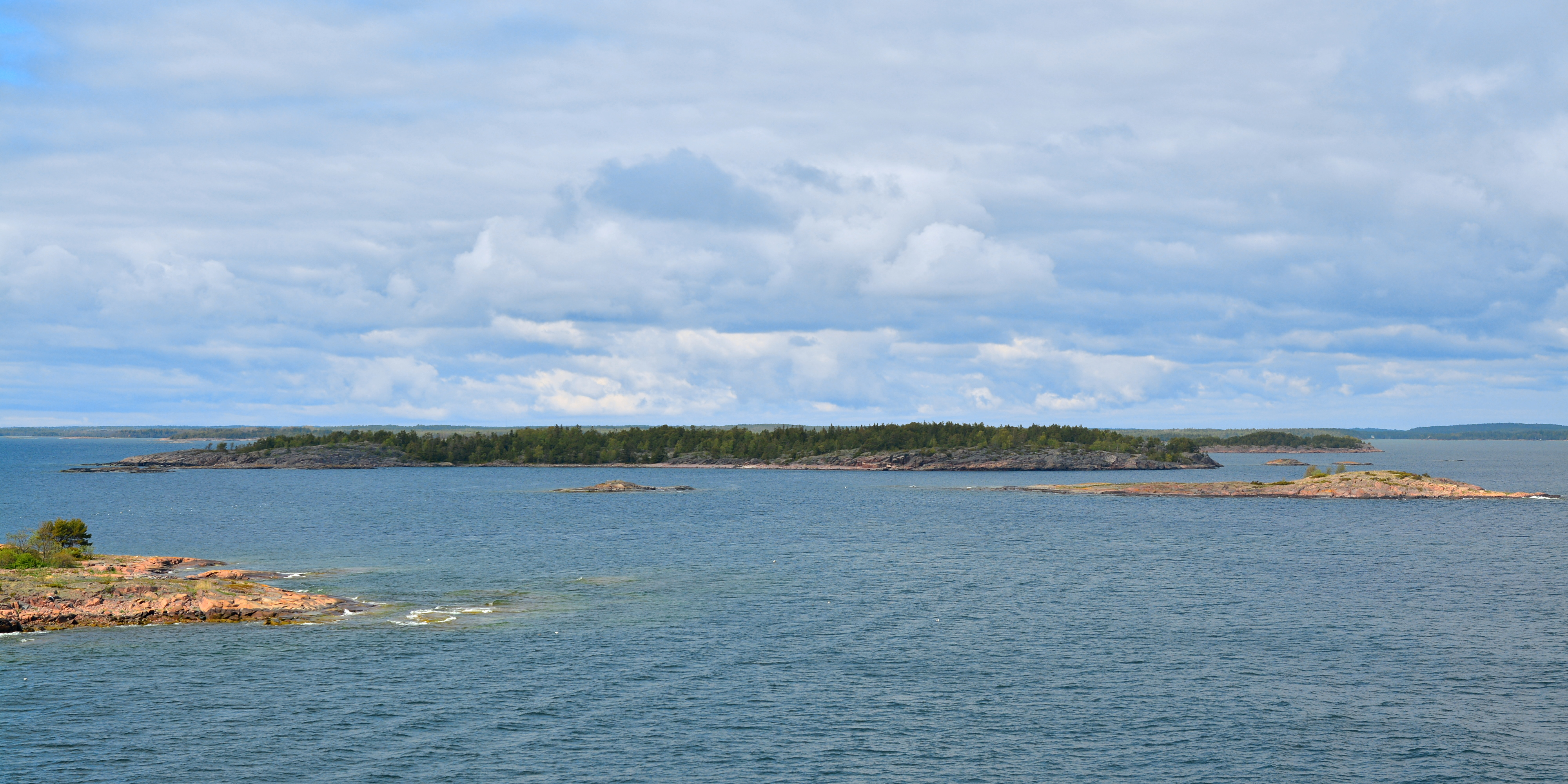 Ön Skogsö utanför Mariehamn, Åland.